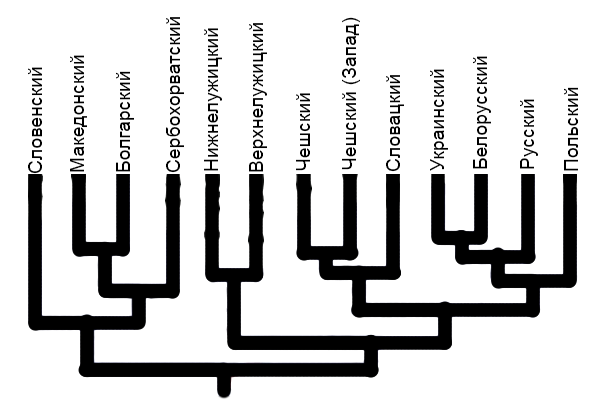 Генеалогическое древо современных славянских языков по Грею и Аткинсону